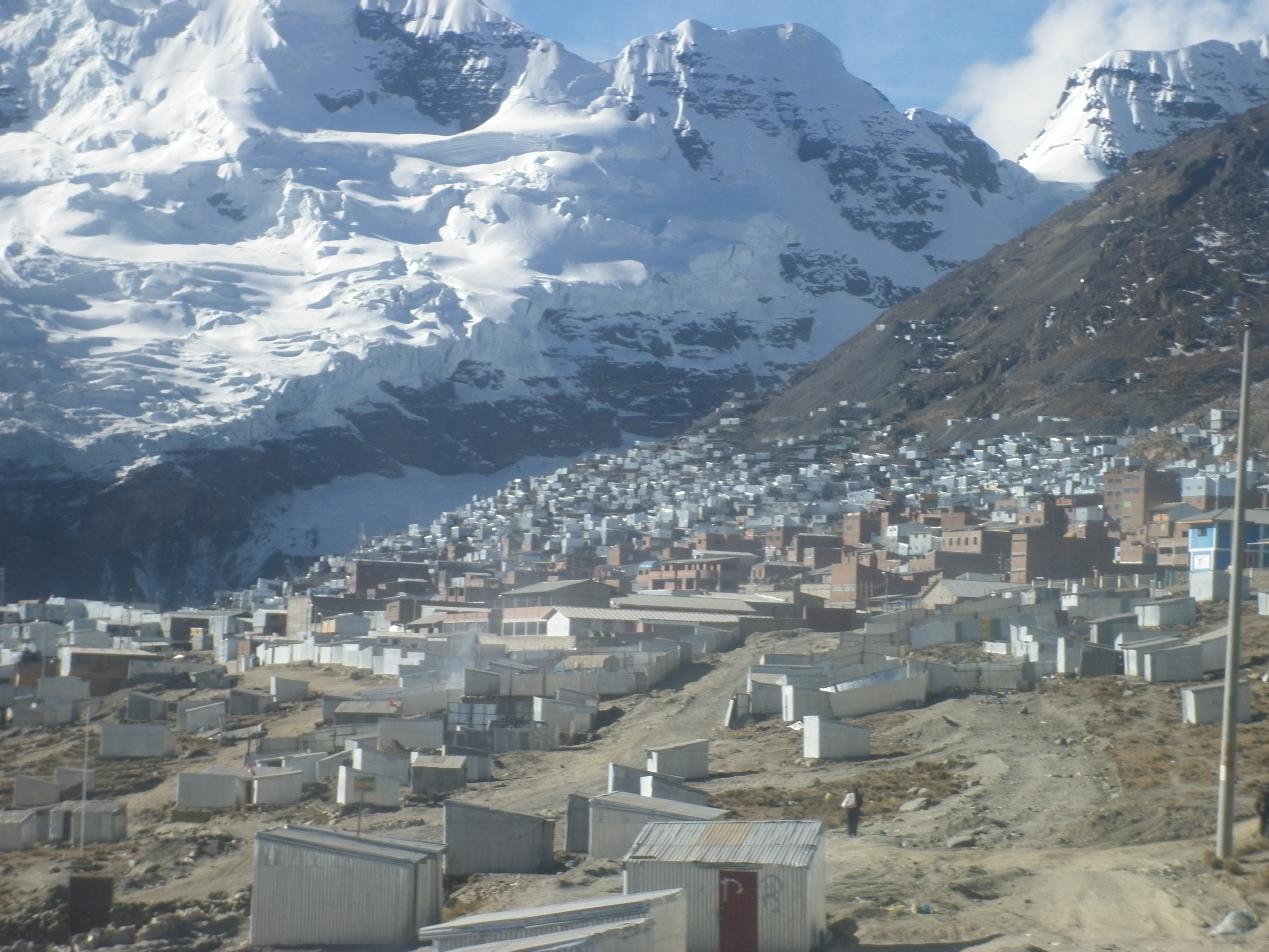 Pueblo de La Rinconada-Ananea, 5400 msnm. Runa Simi: Hatun llactapi Rincunada ritt'ipata